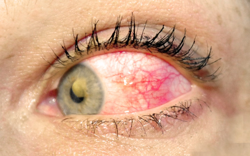 Lederhautentzuendung